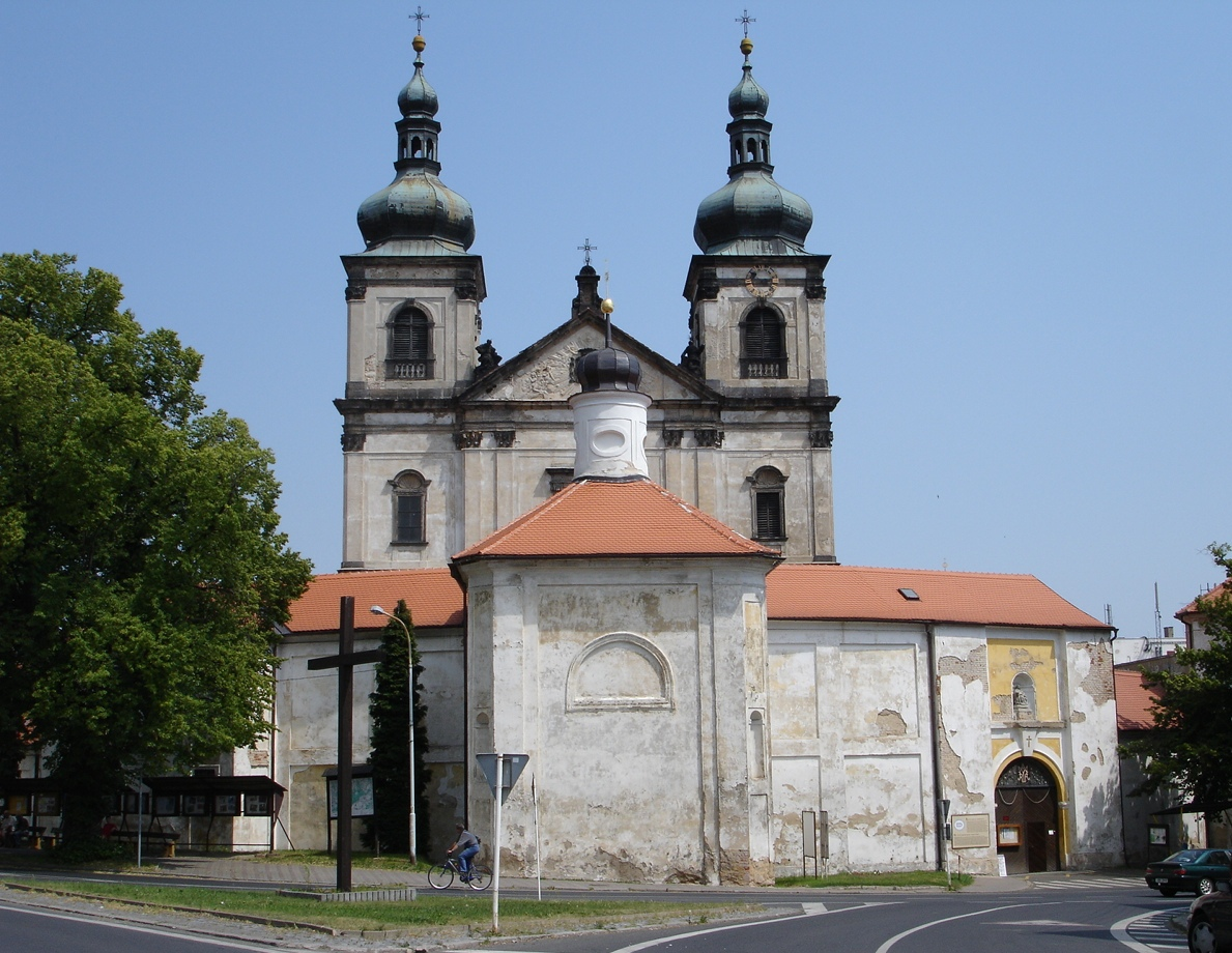 Poutní bazilika Panny Marie Sedmibolestné v Bohosudově (Krupka).